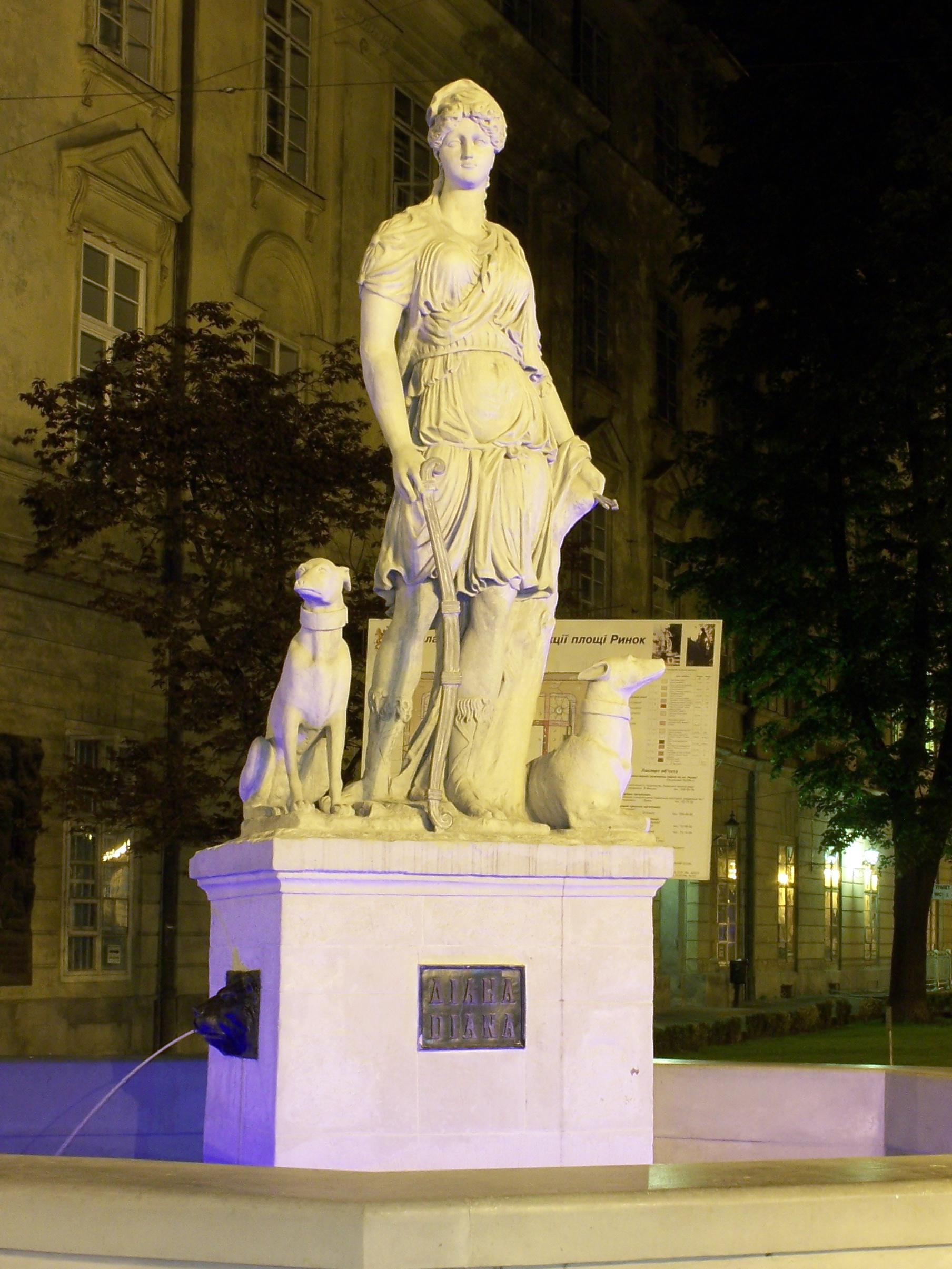 Rzeźba Diany na rynku we Lwowie (Ukraina).